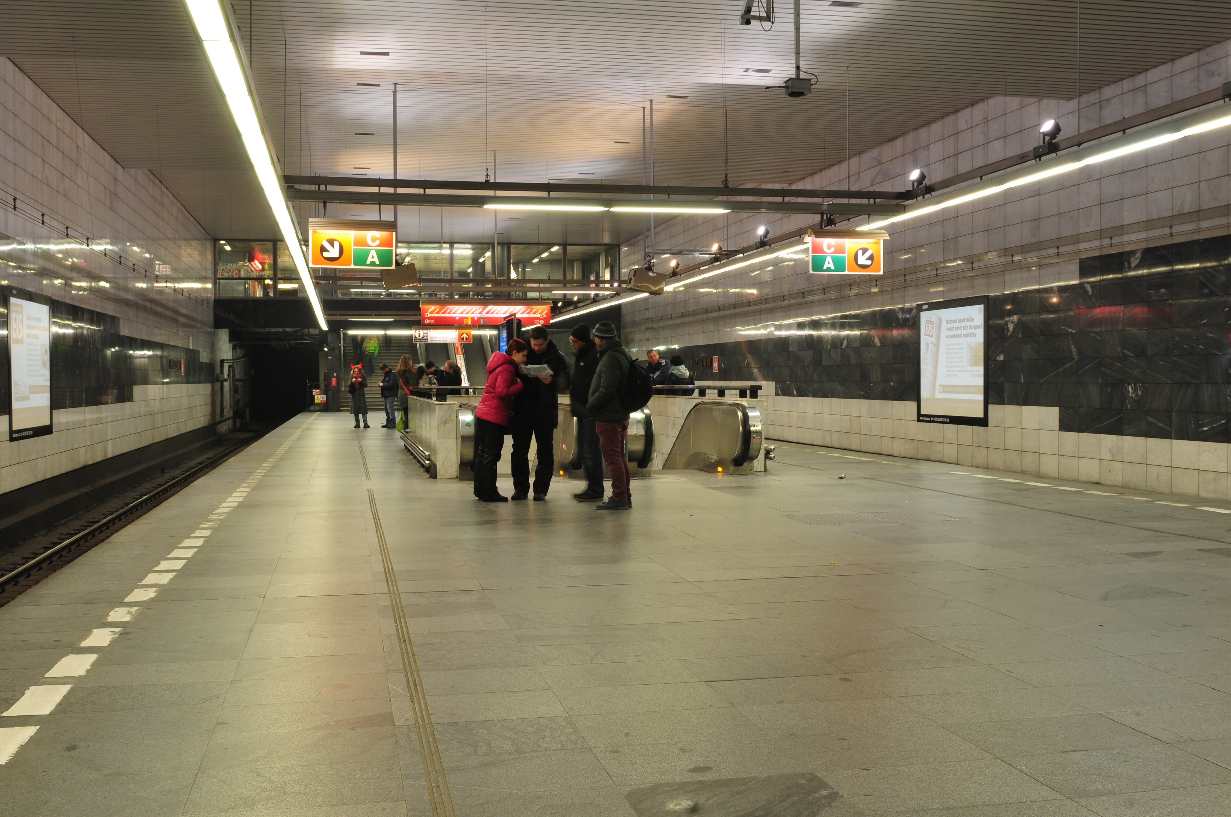 Metro Praha